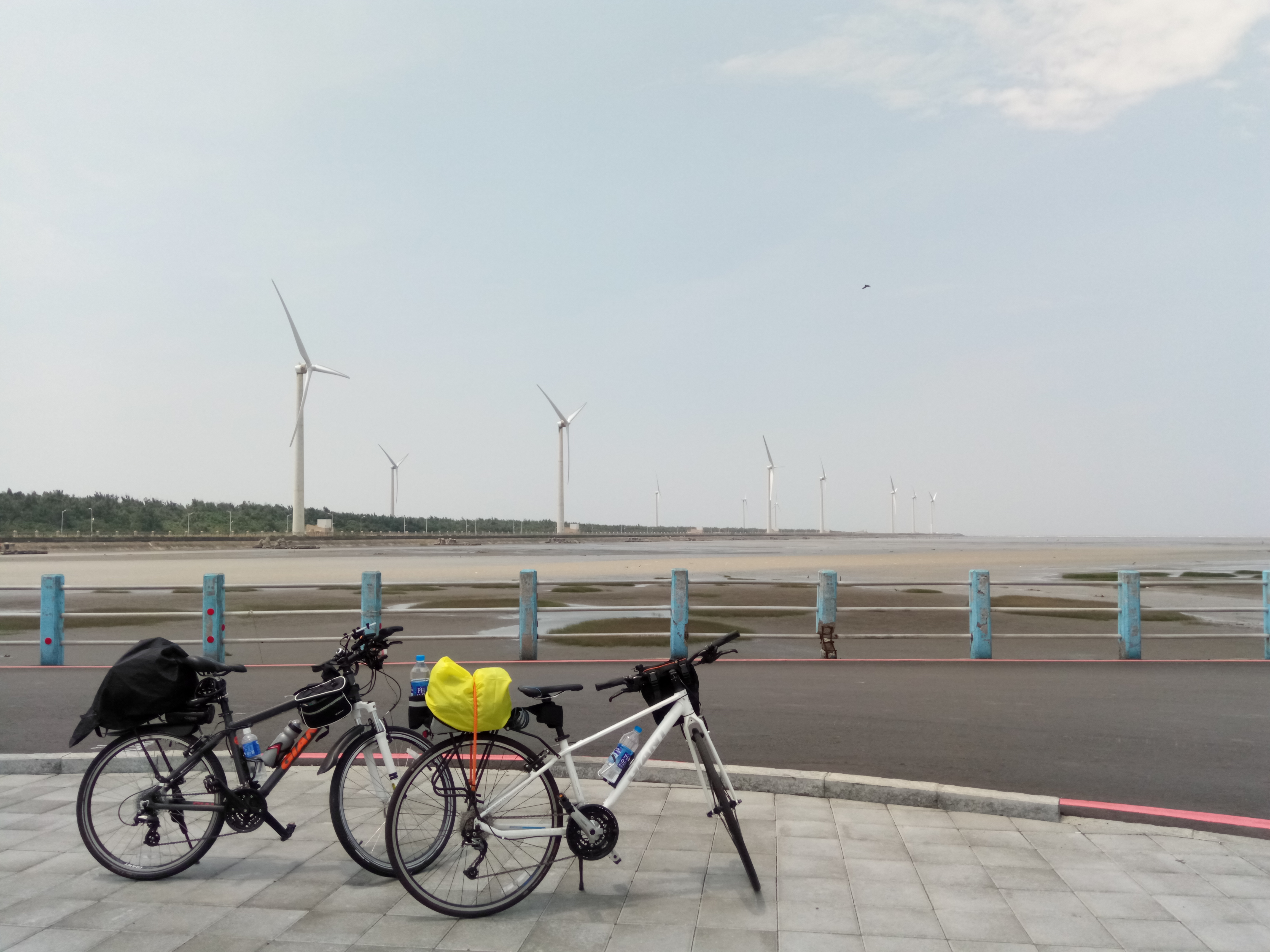 高美濕地風力發電機與捷安特腳踏車。